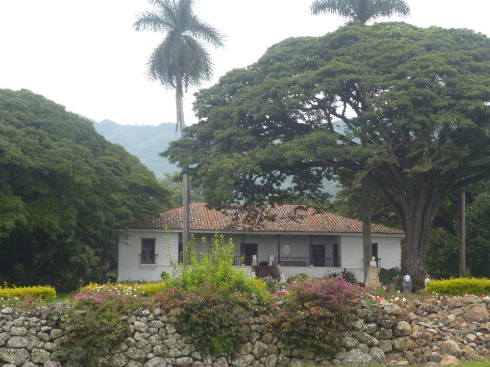 Hacienda donde se desarrolla la novela María de Jorge Isaccs